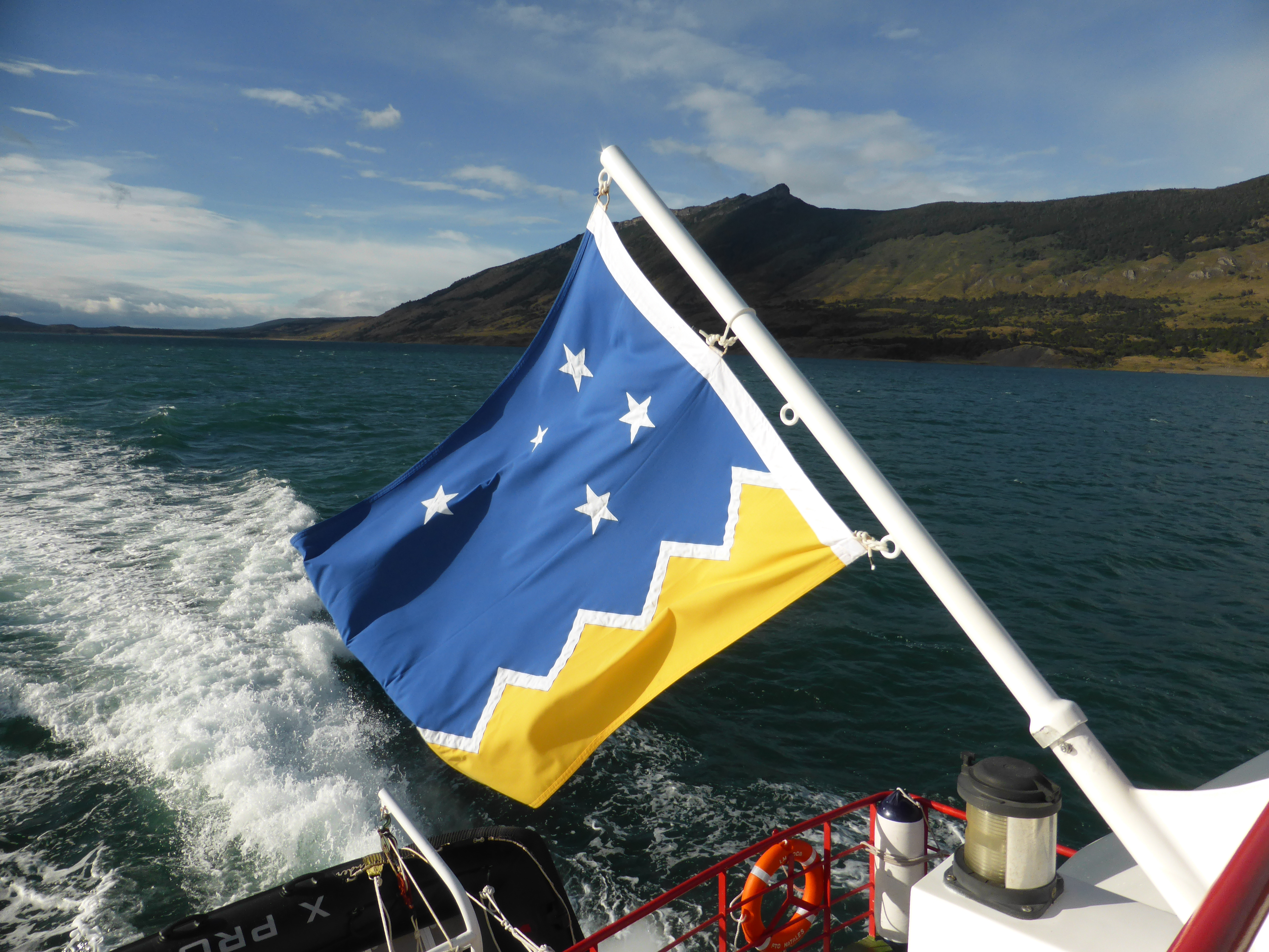 Bandera de la Región de Magallanes y de la Antártica Chilena. Desde la ciudad chilena de Puerto Natales, y más concretamente desde Puerto Bories, salen barcos turísticos con destino a los glaciares Balmaceda y Serrano, navegando por el seno Última Esperanza. En este caso el barco ondea la bandera magallánica, en la popa.